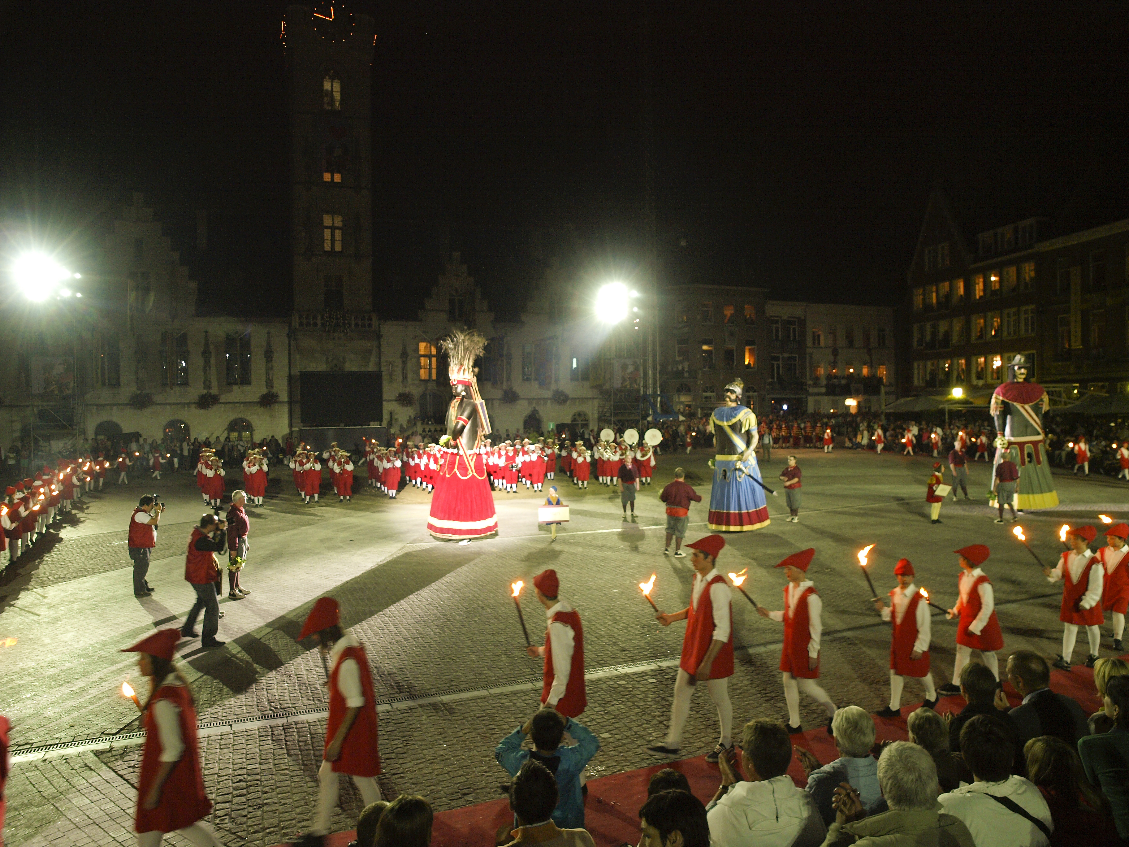 De 3 gildereuzen van Dendermonde